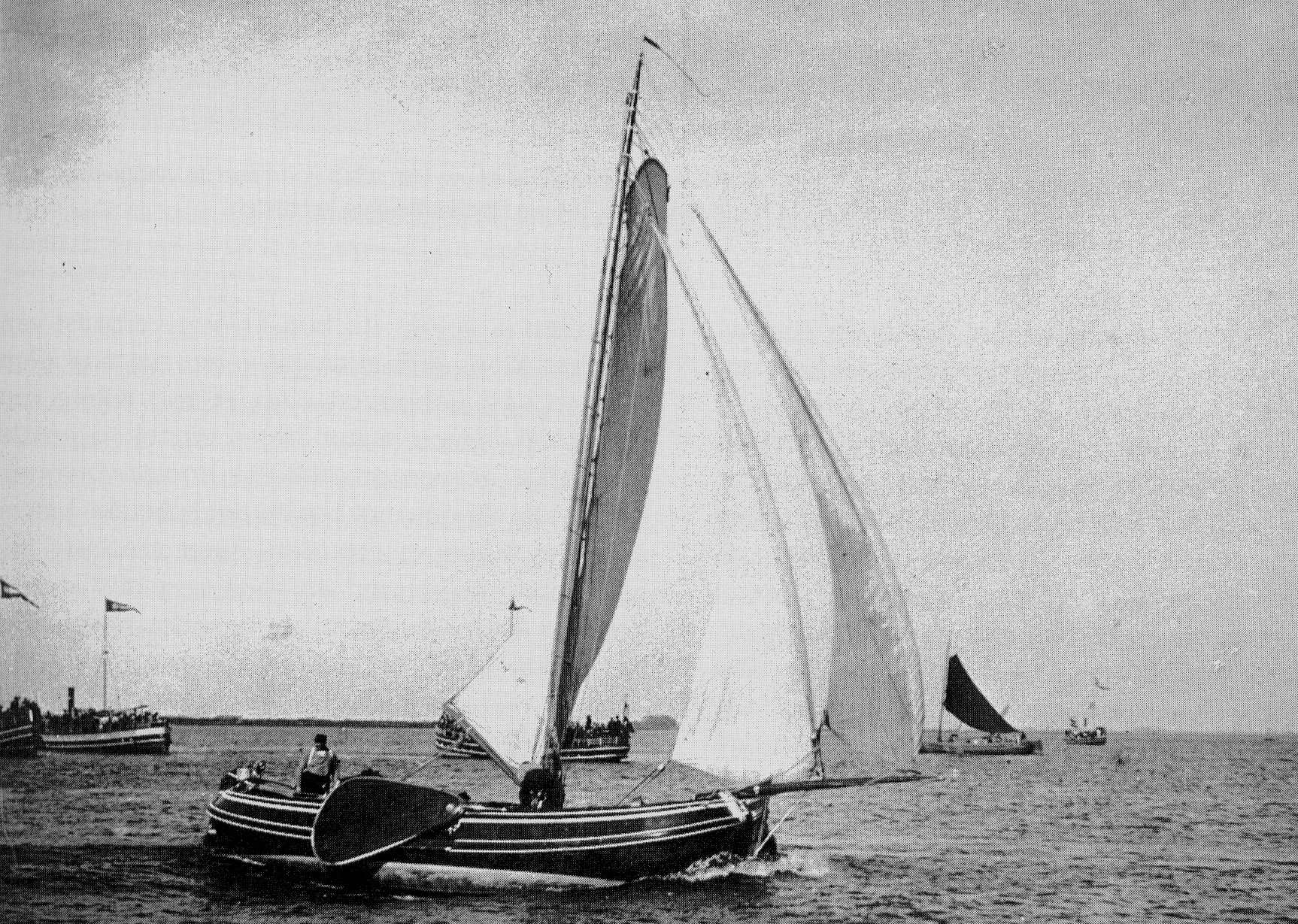 De Commissaris-boeier "Friso", foto op 22 augustus 1906 op het Snekermeer. Aan het roer is Mr. P.A.V. Baron van Harinxma thoe Slooten, die de hardzeildag heeft gewonnen.